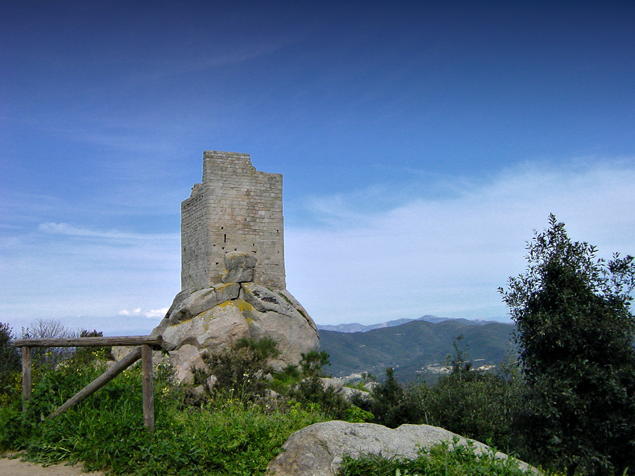 Marina di Campo (Île d'Elbe - Livourne) - Tour de San Giovanni in Campo